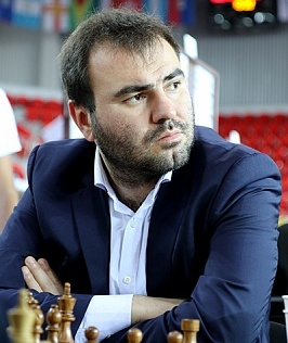 Şəhriyar Məmmədyarov 2018 Şahmat Olimpiadasında